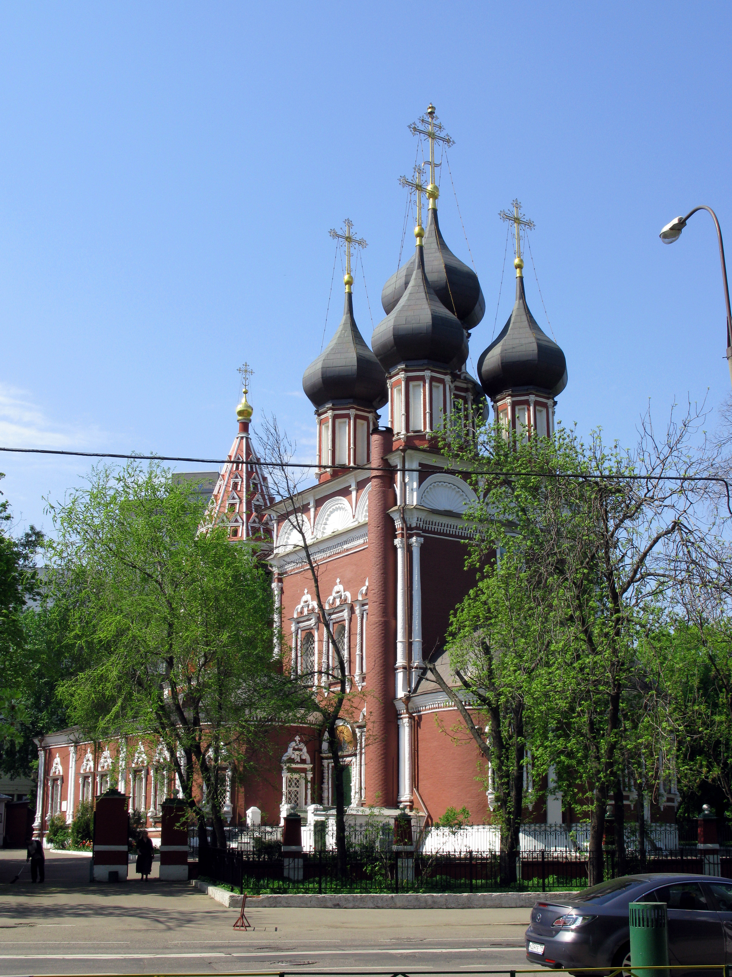 Храм Ризоположения (Положения ризы Христа Спасителя в Успенском соборе в Москве) на Донской